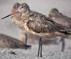 Marbled Godwit, Limosa fedoa